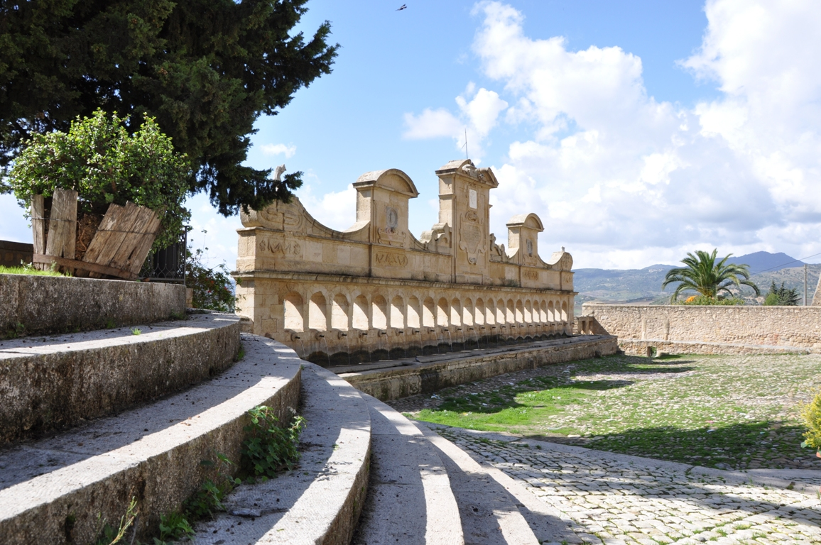 la granfonte,in siciliano "Brivatura"